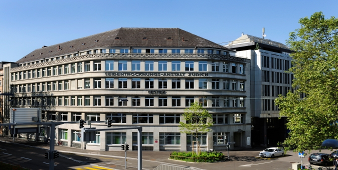 Das Firmendomizil der TESTEX AG heute